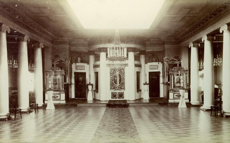 Церковь Марии Магдалины ИМТУ. В настоящее время в помещении храма располагается зал Учёного Совета МГТУ им. Н. Э. Баумана